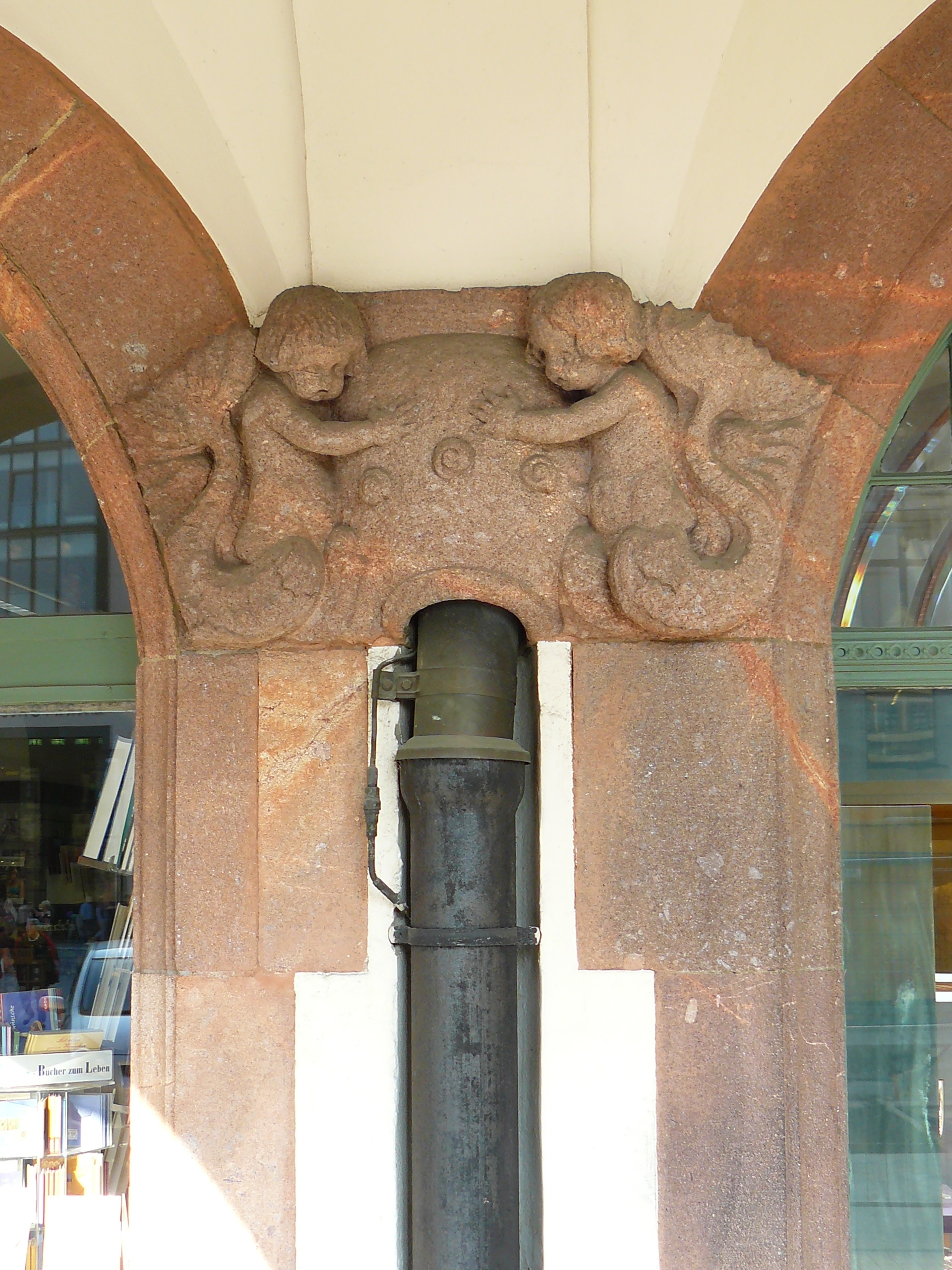 Bauschmuck am alten Rathaus in Leipzig (Rochlitzer Porphyrtuff)